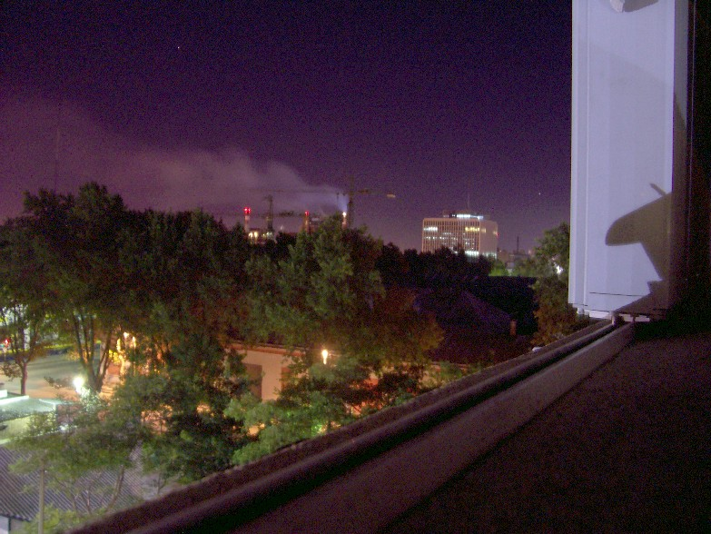 Al fondo, sede central de UTE y planta de generación de energía eléctrica Batlle y Ordoñez, vista nocturna. Tomada por Federico Corral aka Shant.